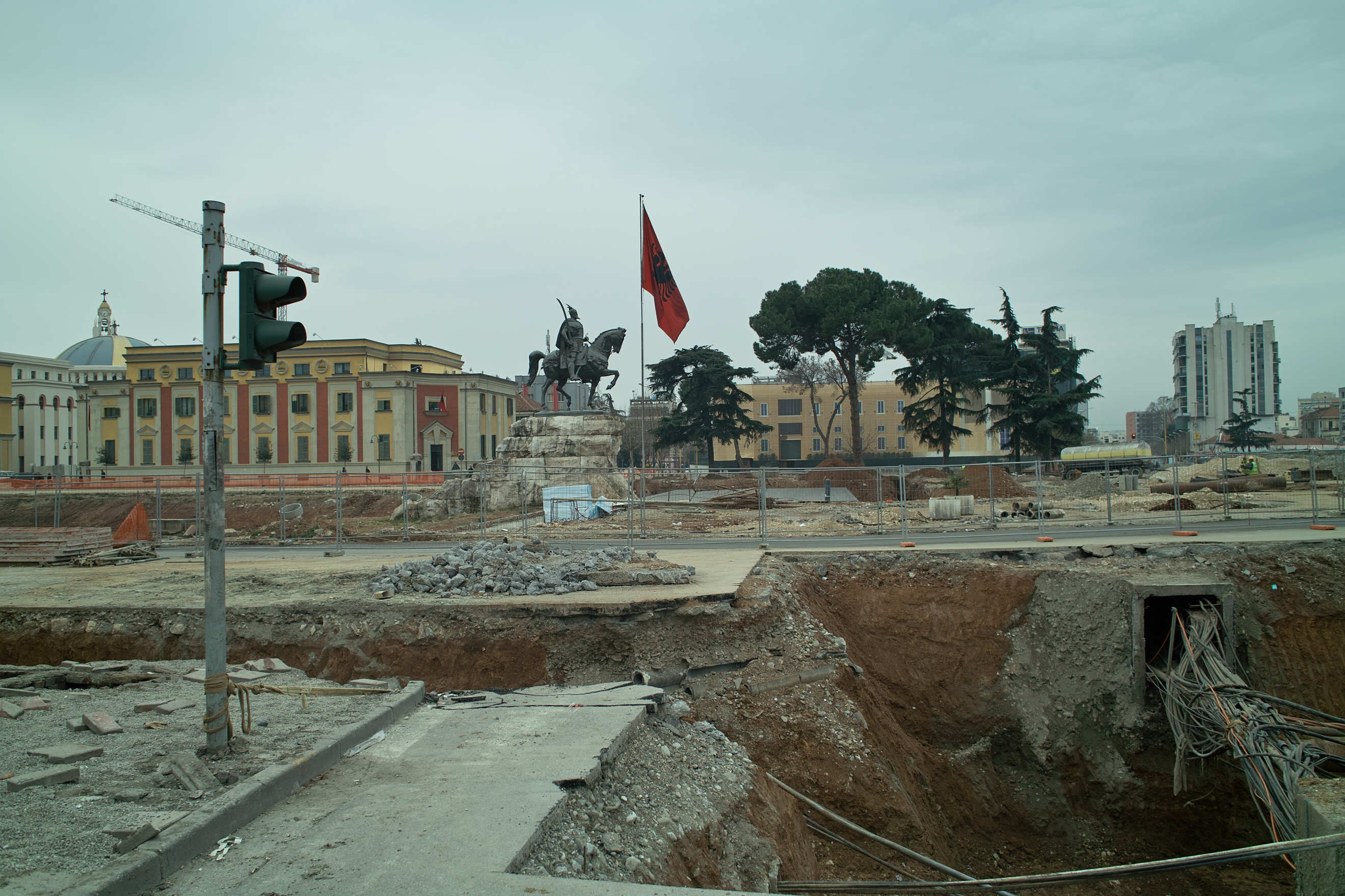 Skanderbeg square under reconstruction